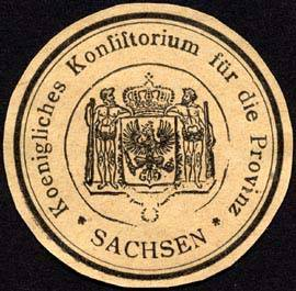 Sealing stamp Title: Koenigliches Konsistorium für die Provinz Sachsen Description: Briefsiegel, weiß, schwarz Place: Magdeburg size: 4 cm